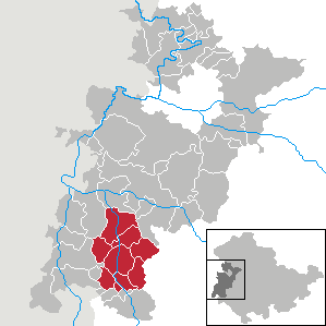 Verwaltungsgemeinschaft Dermbach in Thuringia - Wartburgkreis